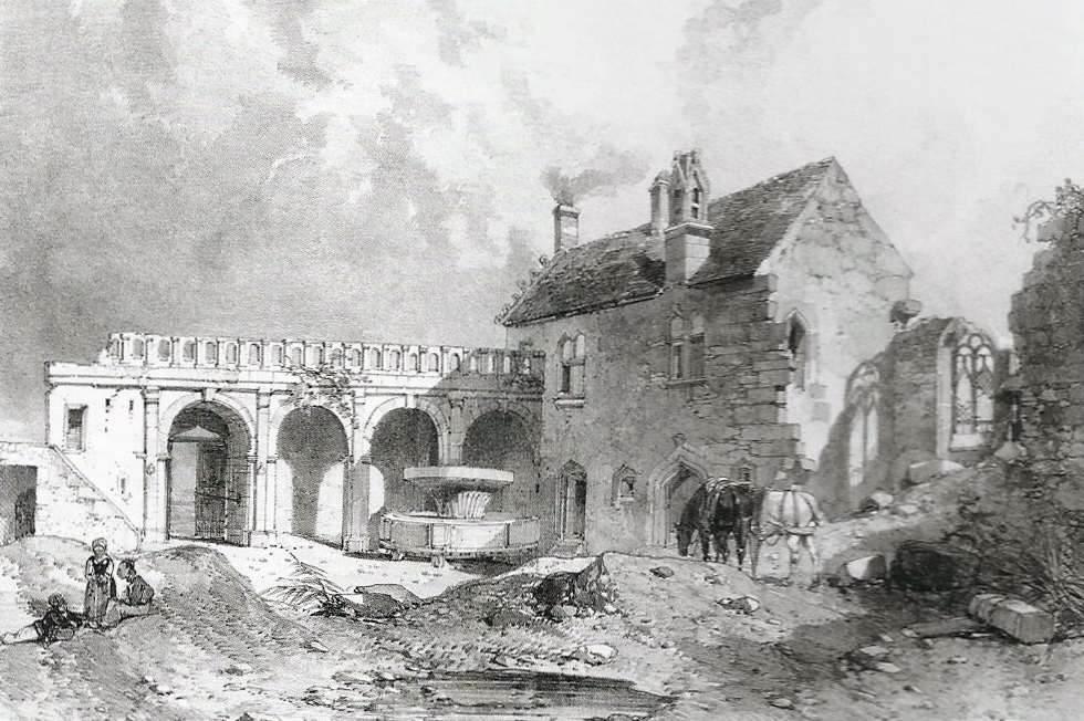 Auguste Mayer : Château de Kerliviré [en fait Kerliviry] (gravure publiée en 1845-1846 dans "Voyages pittoresques et romantiques dans l'ancienne France, Bretagne".